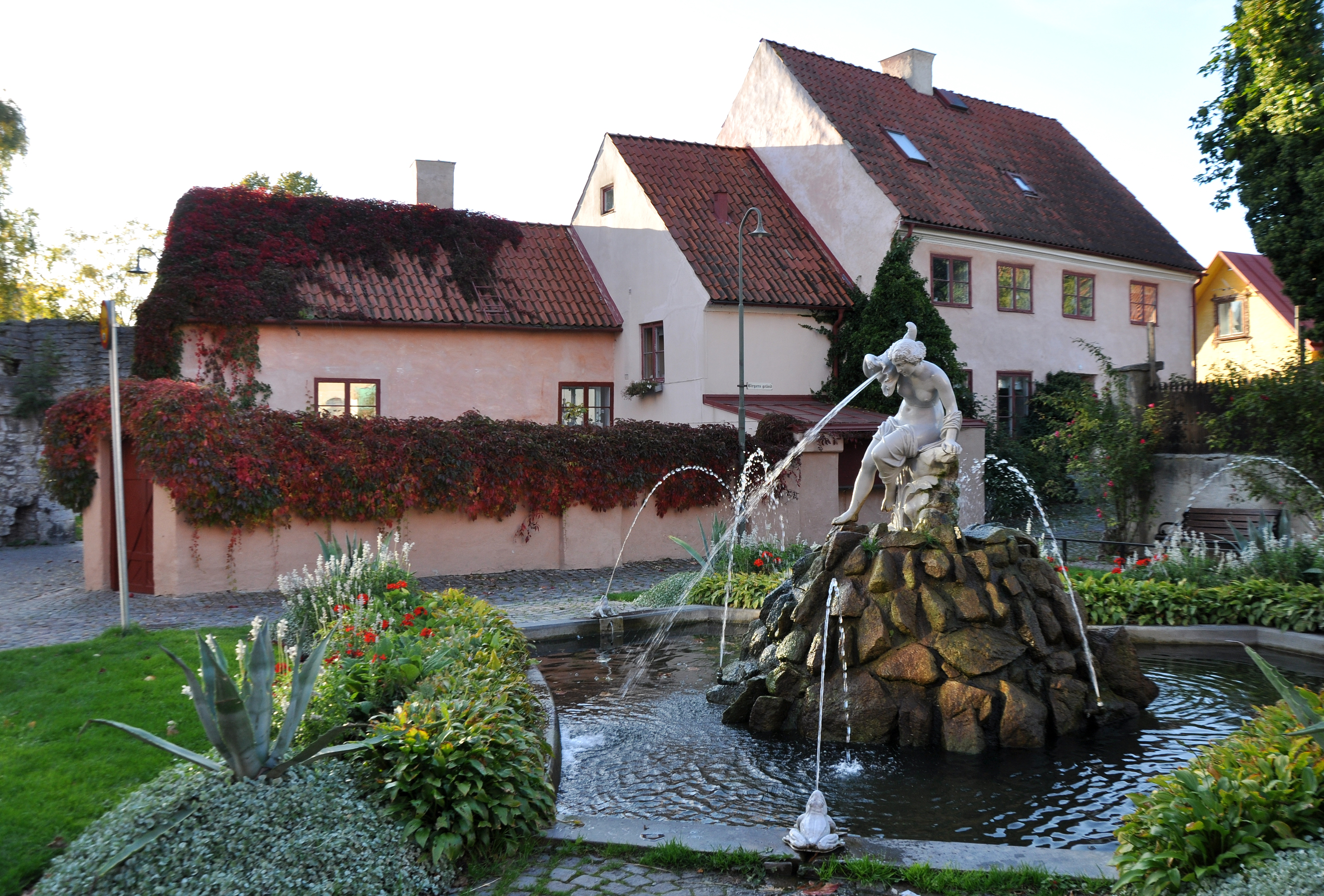 Fontän på Packhusplan, tidigare kallad Rolandstorget i Visby. I bakgrunden syns fastigheten Fregatten 12.